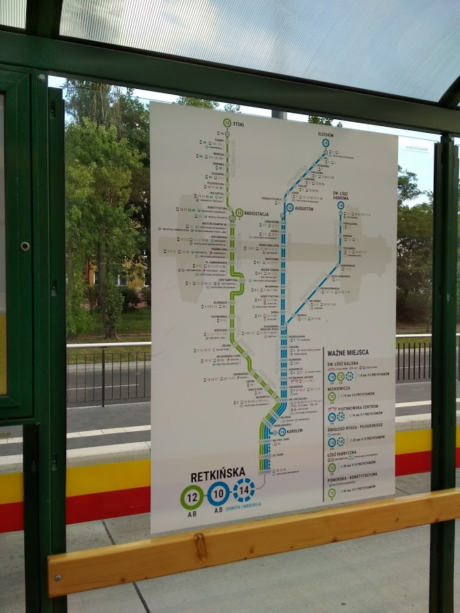 Informacja pasażerska MPK-Łódź na trasie WZ (przystanek Retkińska), w postaci mapy linii tramwajowych. W tle wizualizacja pomniku linii tramwajowej "Ośka", leżącego nieopodal przystanku.